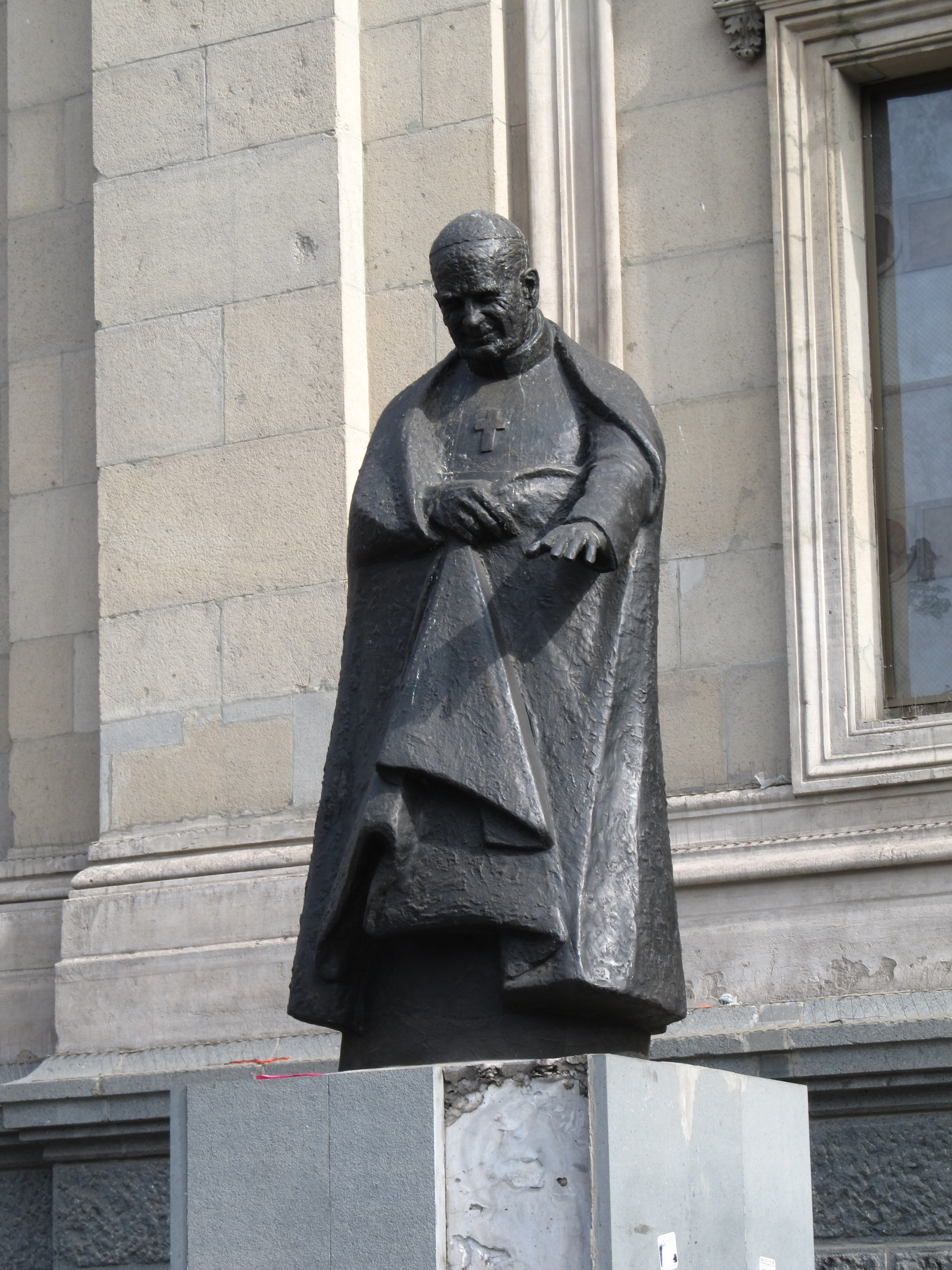 Estatua del cardenal Raúl Silva Henríquez, obra de Galvarino Ponce, frente a la catedral de Santiago, Chile.